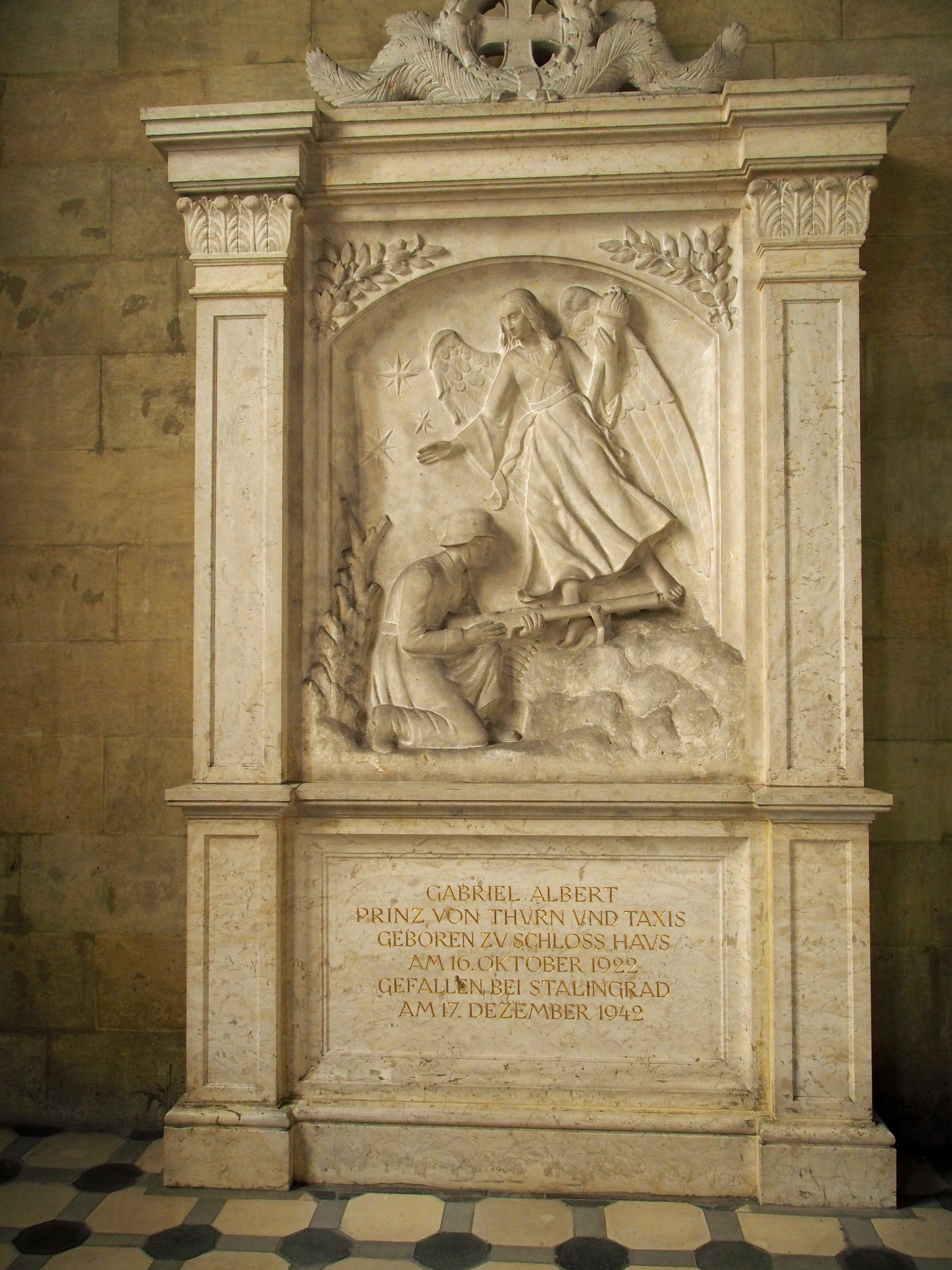 Epitaph Gabriel Albert Prinz von Thurn und Taxis, in der Gruftkapelle Kloster St. Emmaram